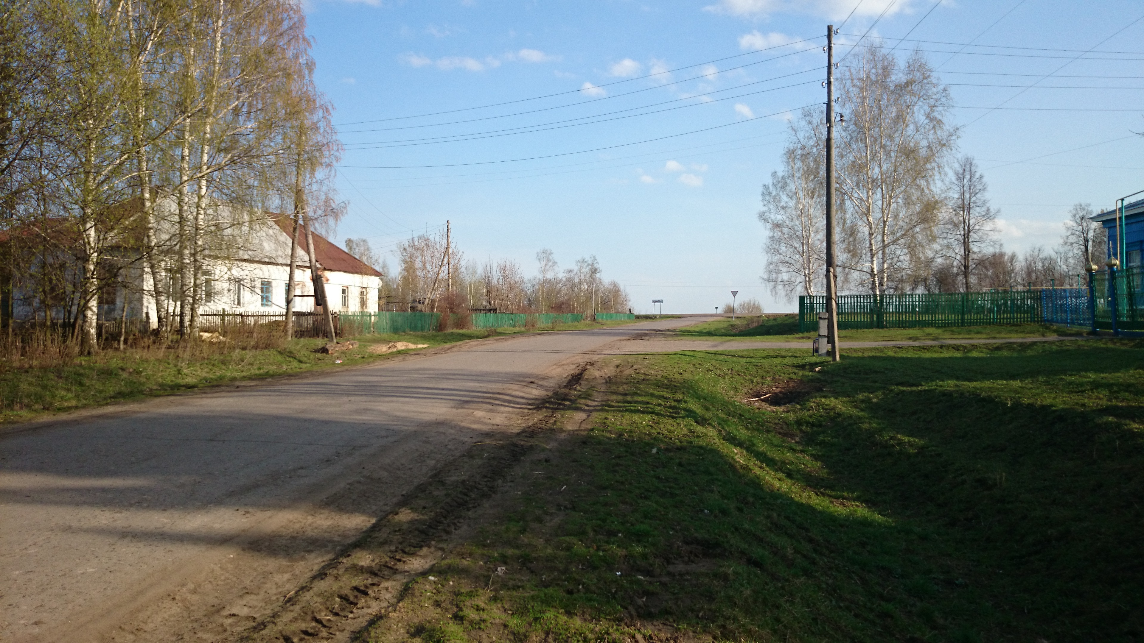 Климово 2 мая 2014